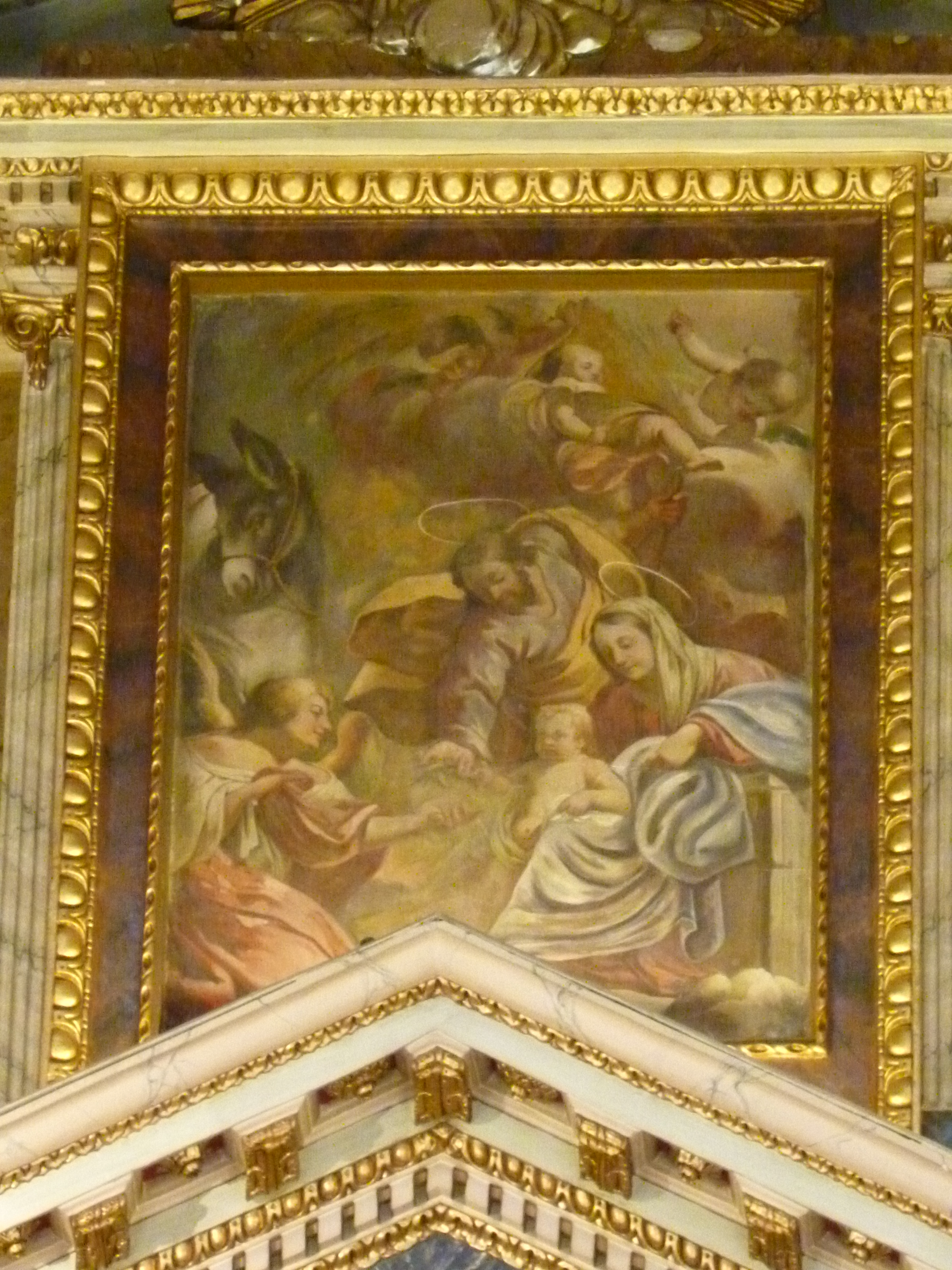 Adoració dels pastors (ca. 1803) de Joaquim Oliet i Cruella. Fresc situat a l'àtic del retaule major, a l'església del Sant Àngel Custodi de la Vall d'Uixó (Plana Baixa)